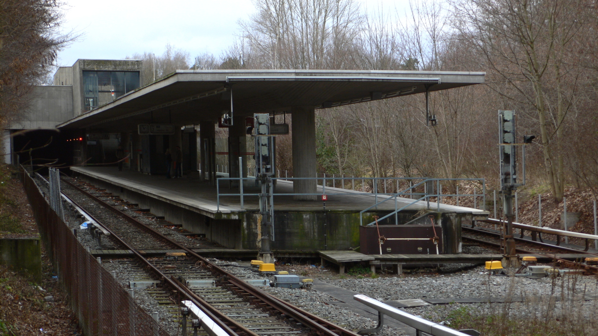 U-Bahnhof Bauernfeindstraße der U-Bahn Nürnberg, Außenansicht, Blick von Südosten